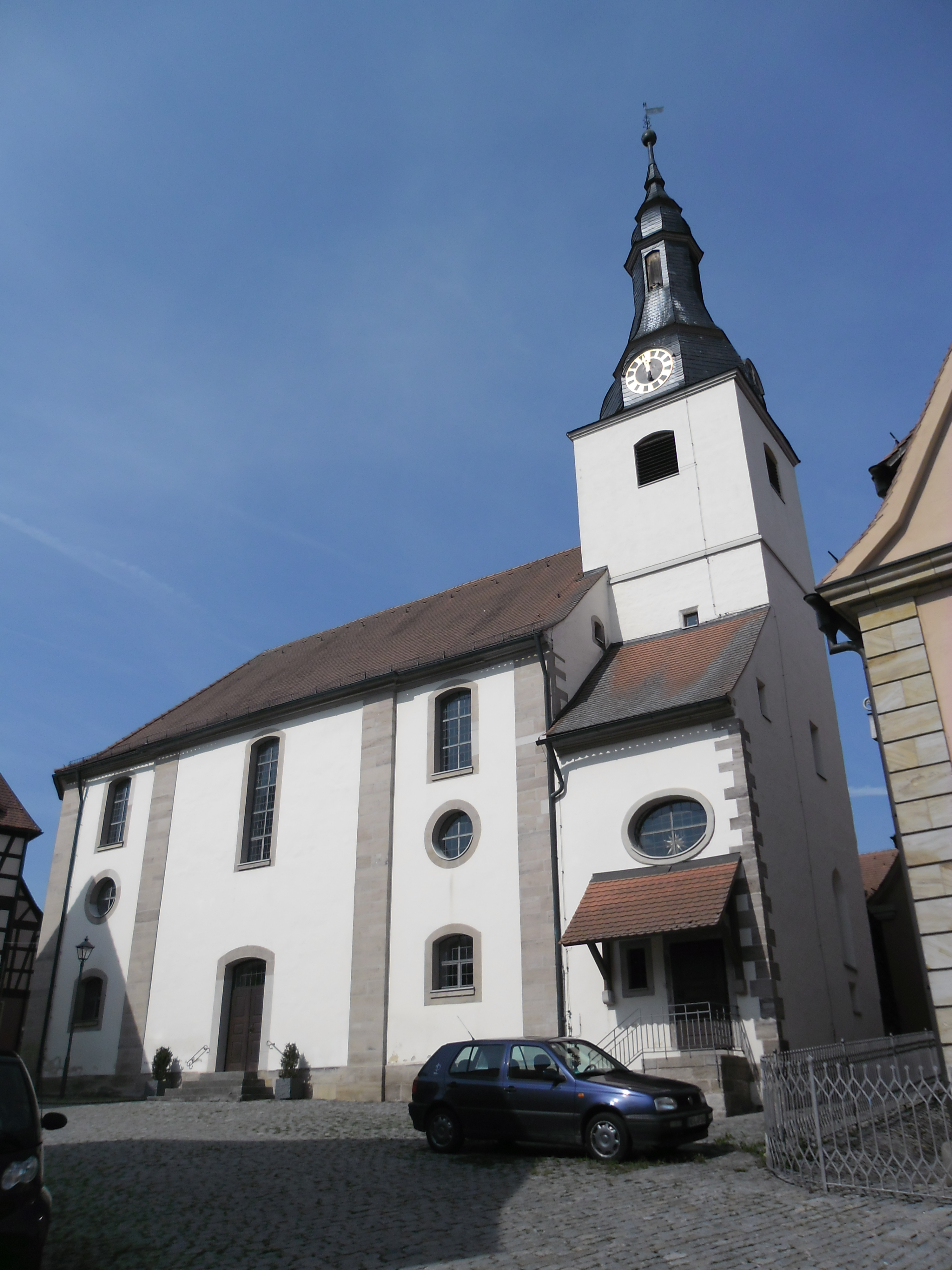 Kirche Sankt Kilian, Neuhof an der Zenn in Mittelfranken